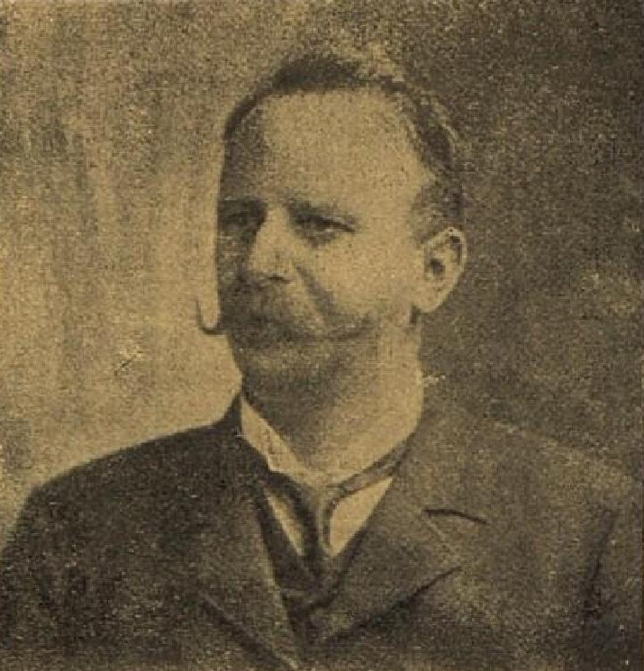 Vilém Černý (1865-1913), rakouský a český politik